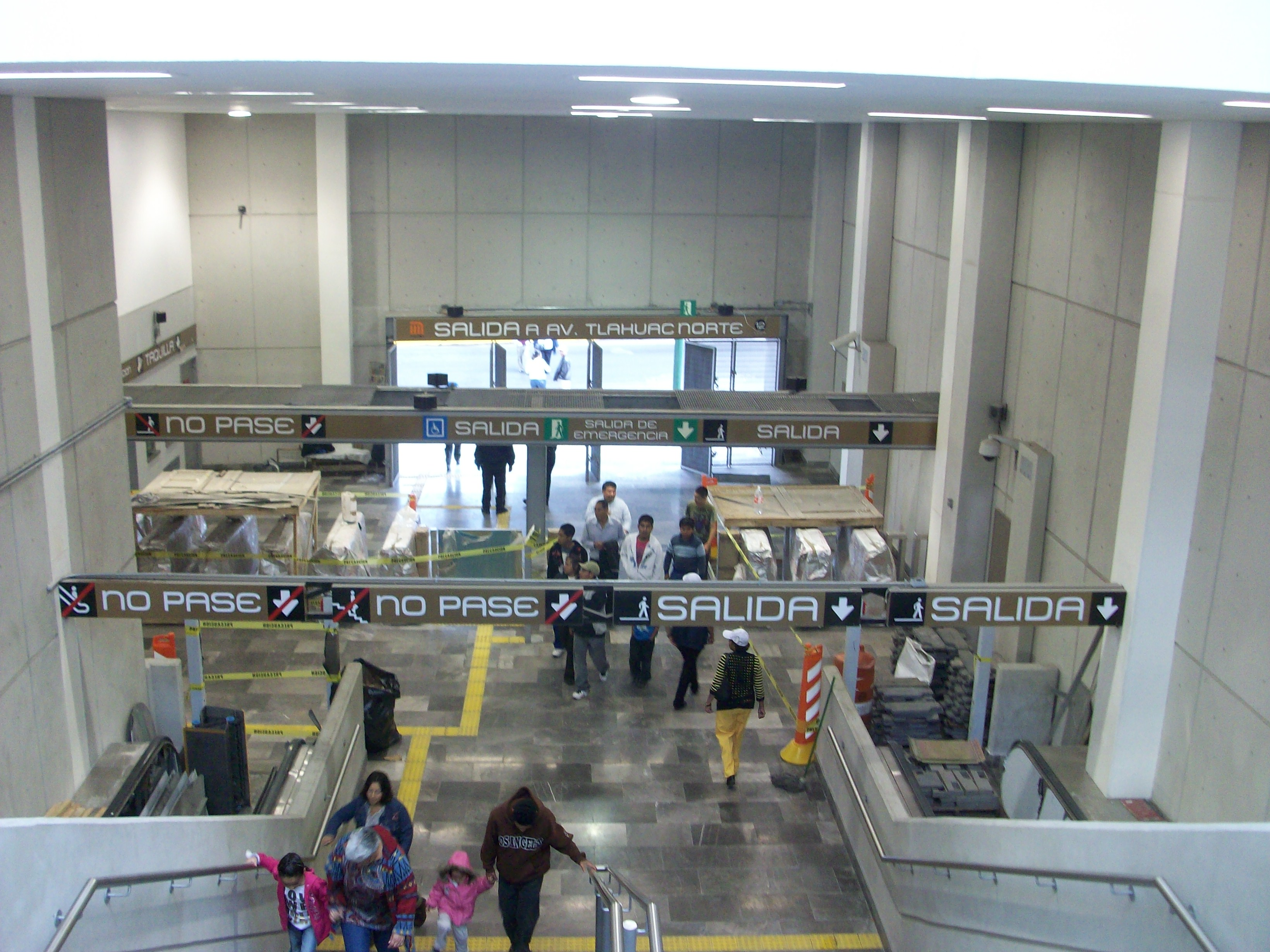 Vestibulo Zapotitlan